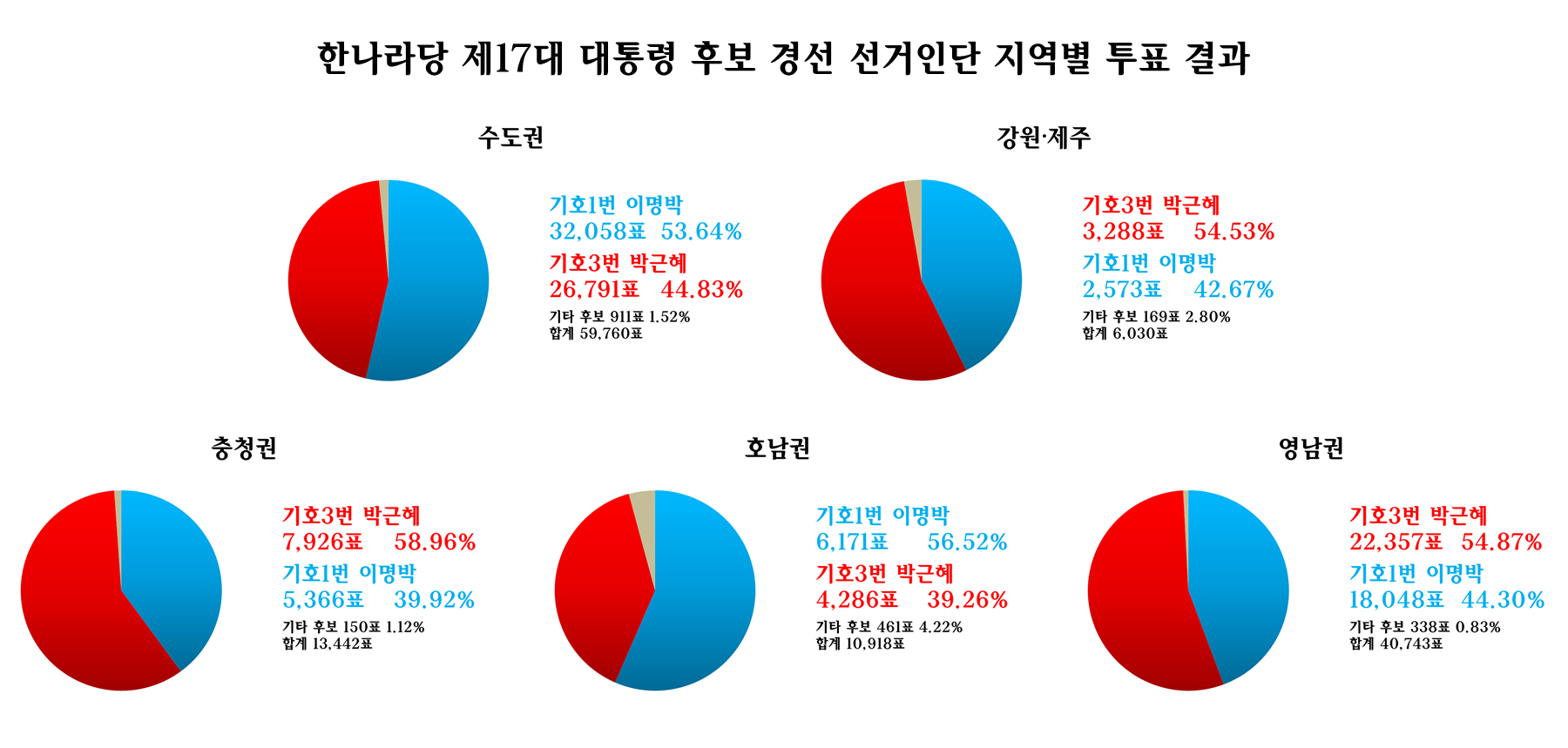 한나라당 제17대 대통령 후보 경선 선거인단 투표 권역별 상세 결과를 파이 그래프로 표시함.